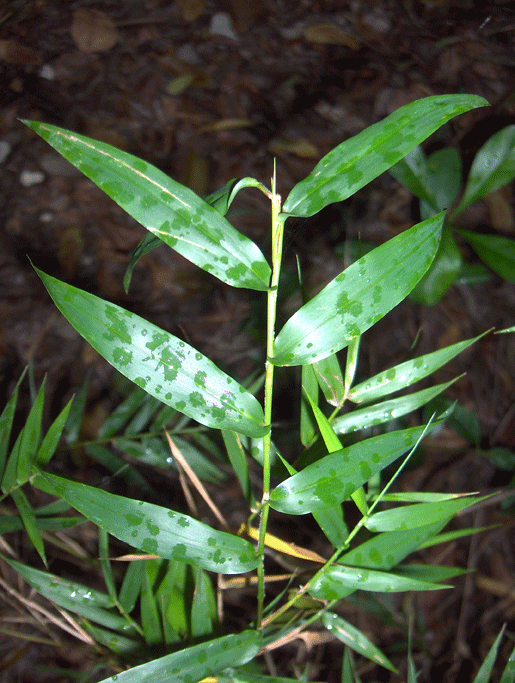 Small Cane